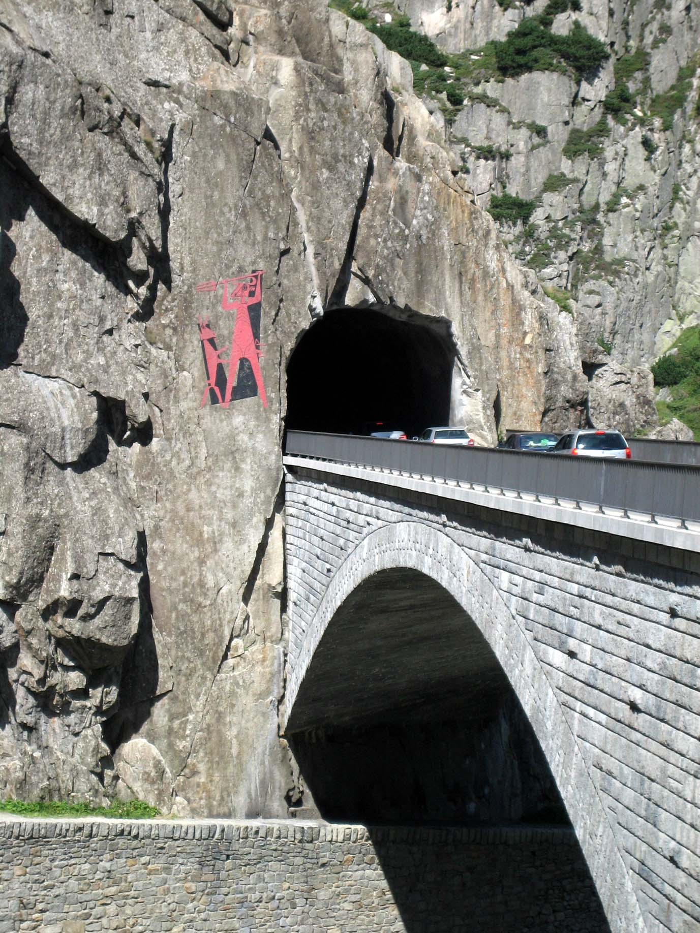 Autobahn, Teufelsbild von Heinrich Danioth